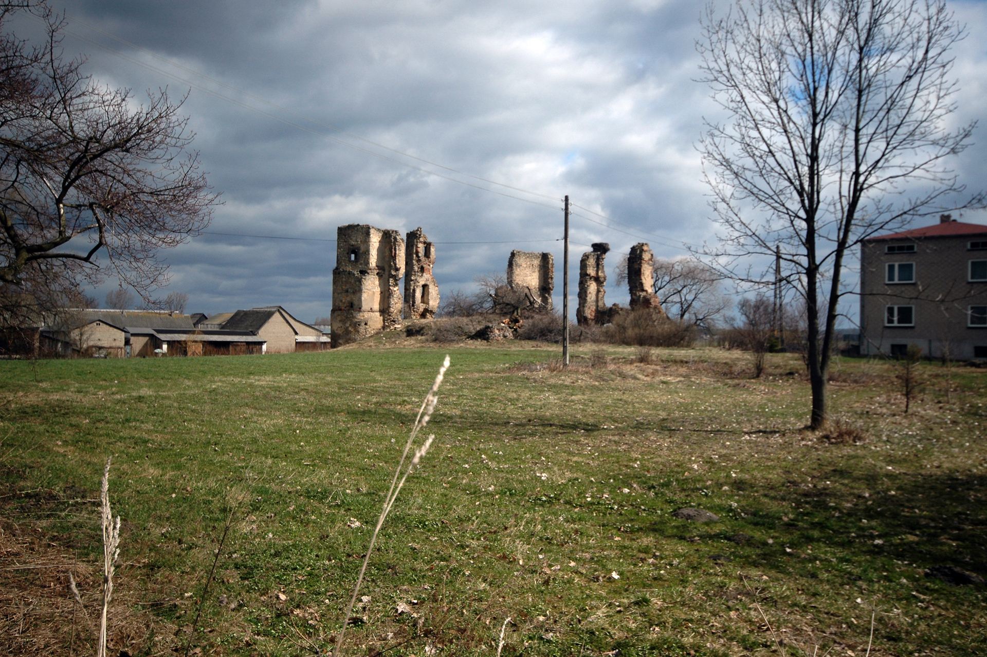 Majkowice - ruiny zamku, I poł. XVI w. (na wzniesieniu na pd-wsch krańcu wsi) 12.1967.